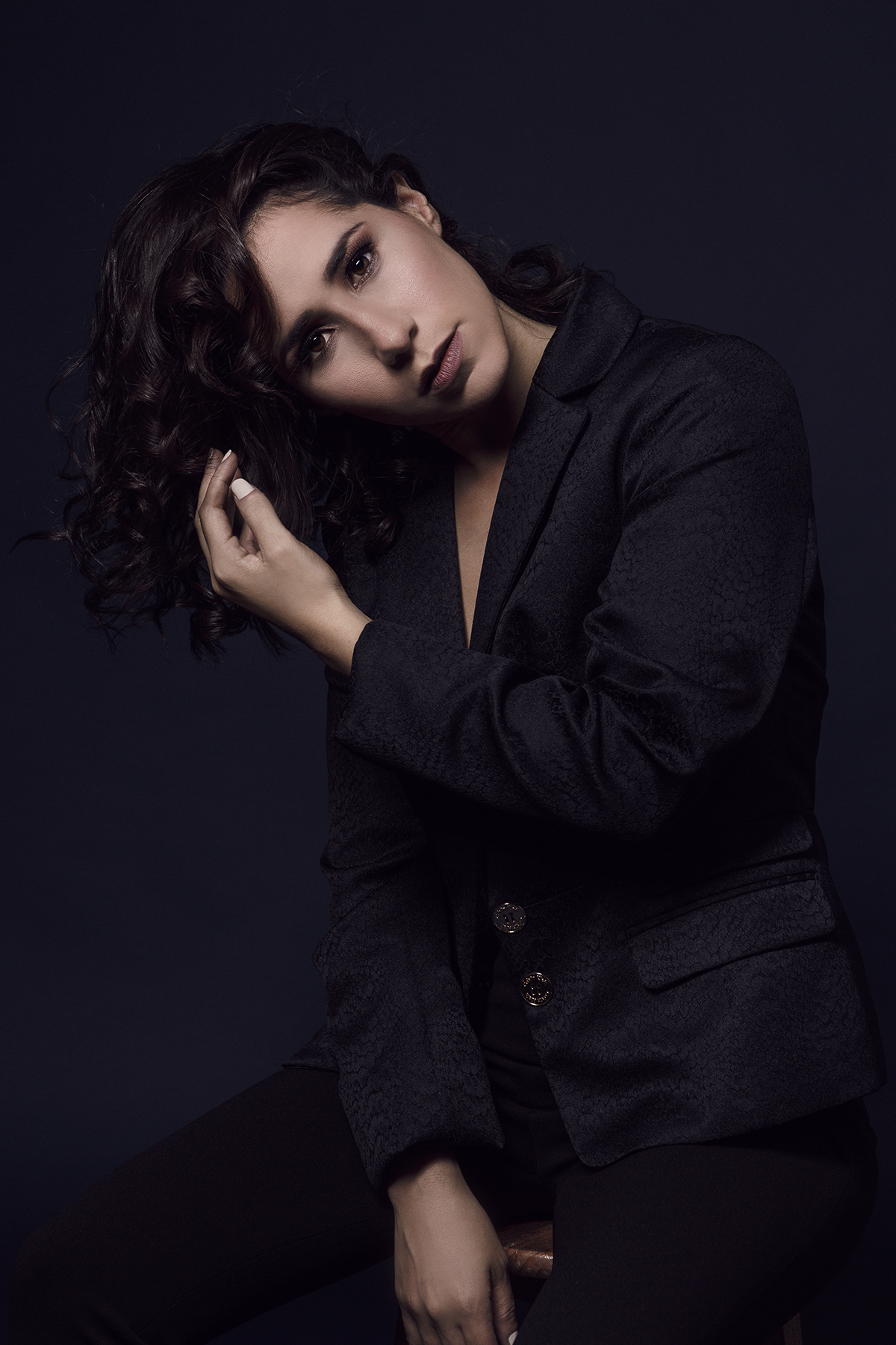 Patricia Barreto Allemant